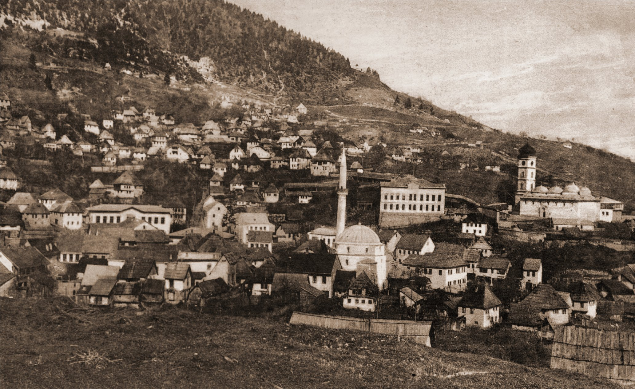 Čajniče (Bosnien-Herzegowina) um 1900. Vorn im Bild die Sinan-Beg-Moschee.